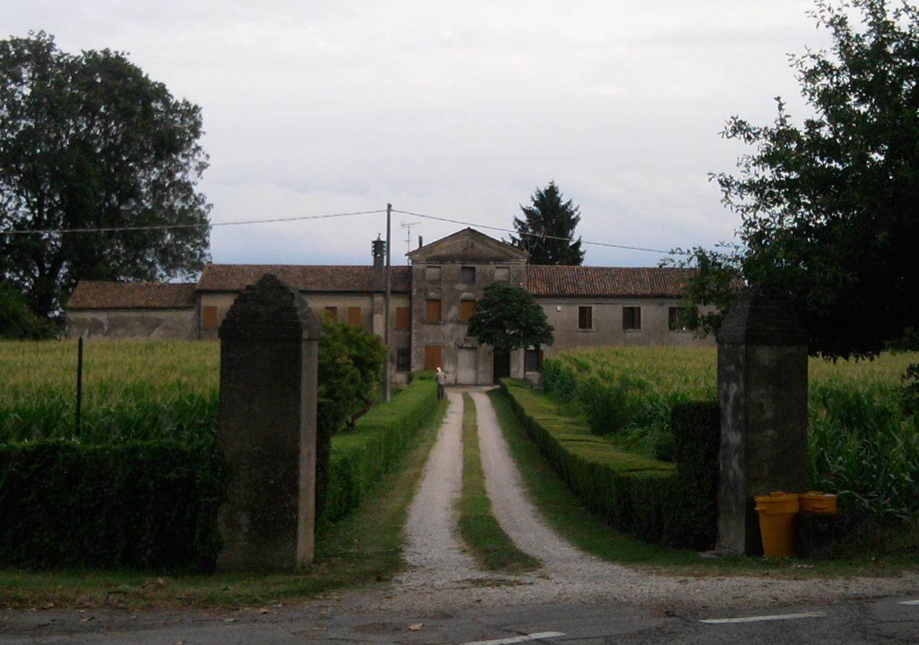 Ramo di Palo, frazione di Lendinara